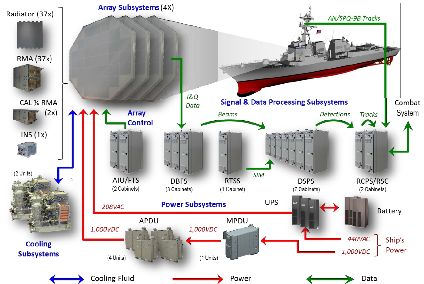 Schéma du systéme radar AN/SPY-6 Air and Missile Defense présenté en 2016.